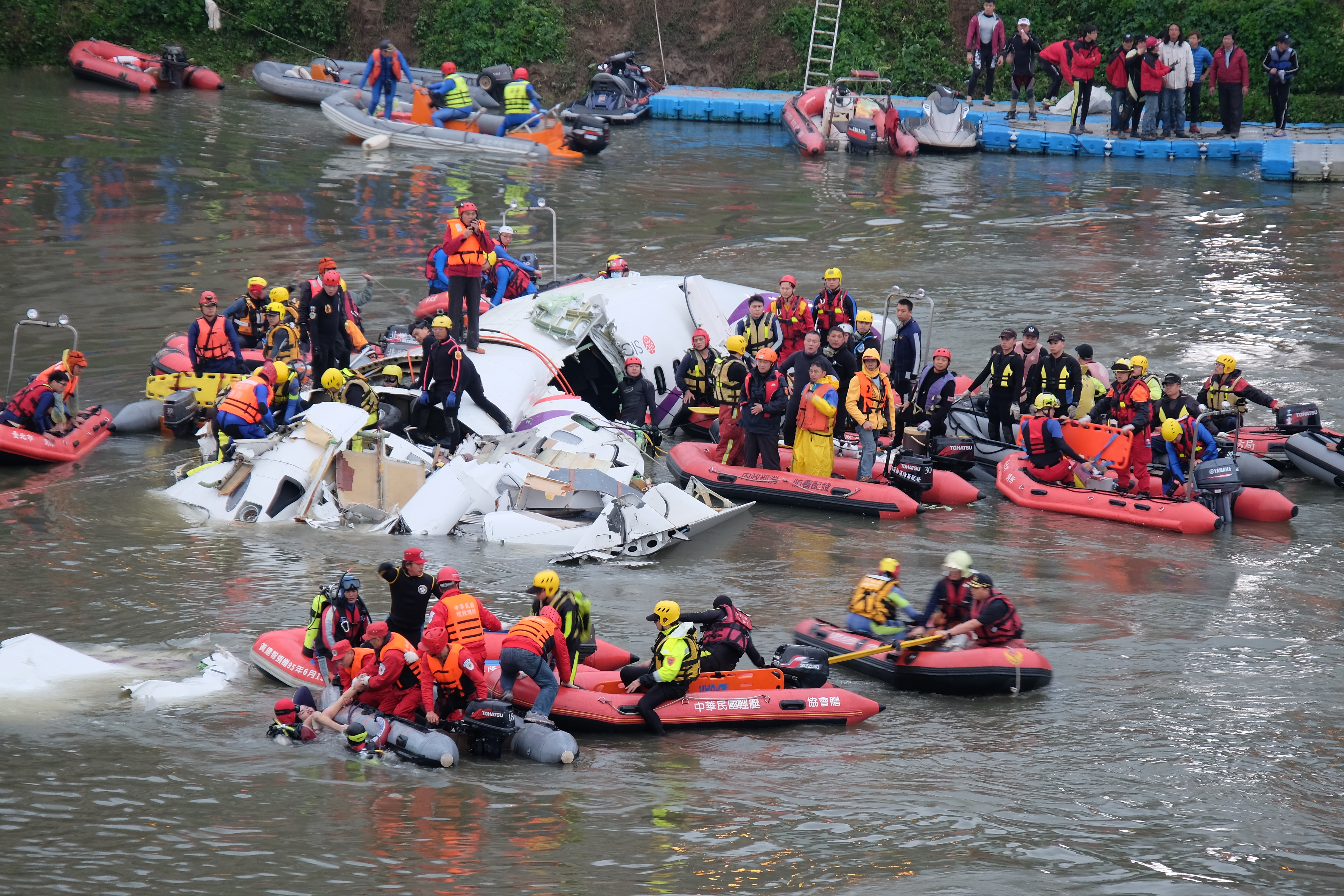 救難潛水人員從沉入水中的復興航空ATR 72-600 B-22816機首發現罹難者遺體，全場屏息以對。